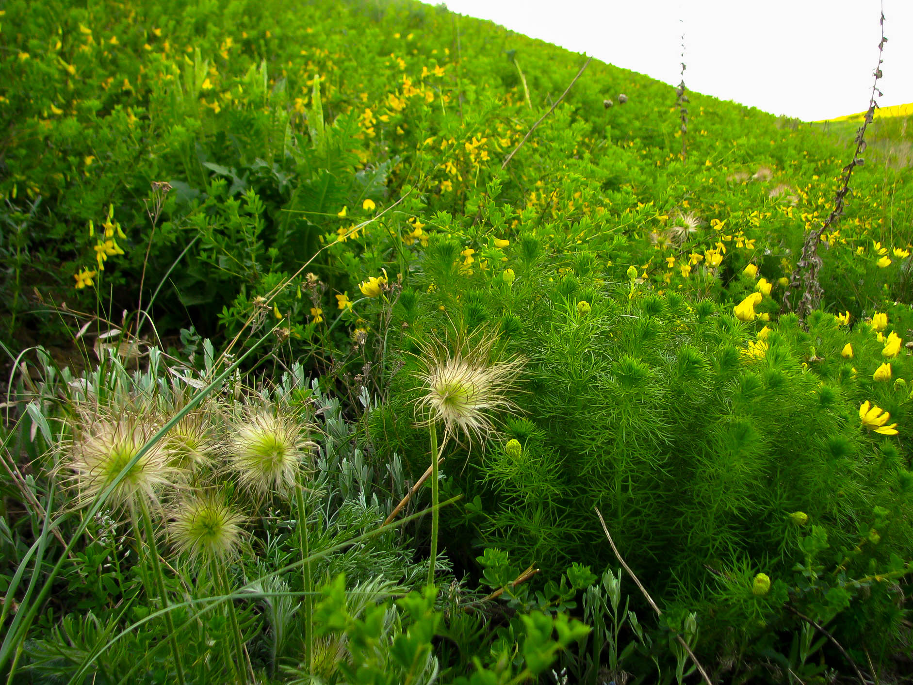 Ломиніс цілолистий (Clematis integrifolia L. ?), Горицвіт весняний (Adonis vernalis) та Карагана кущова у заказнику «Альошкина балка»